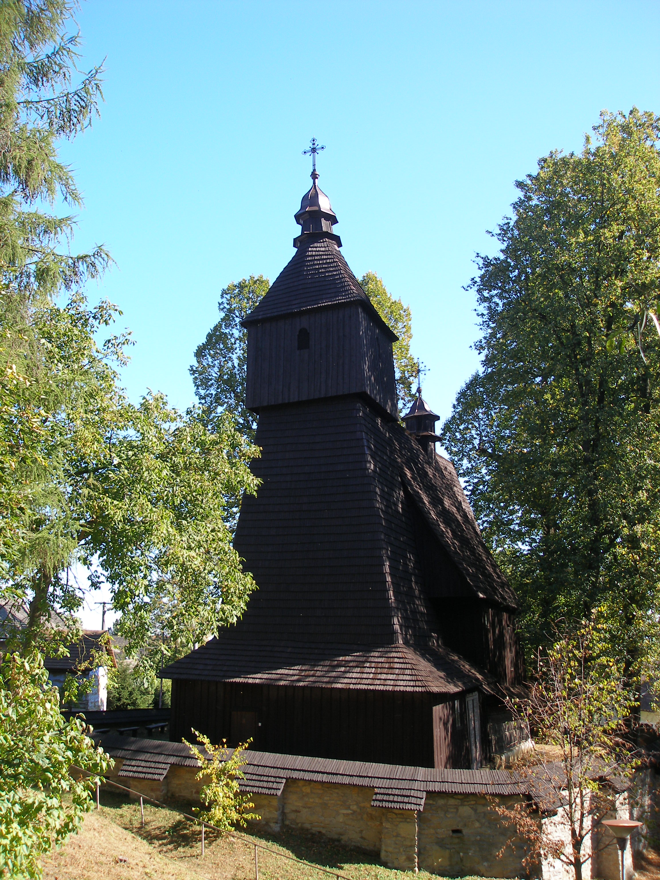 Obec Hervartov okres Bardejov